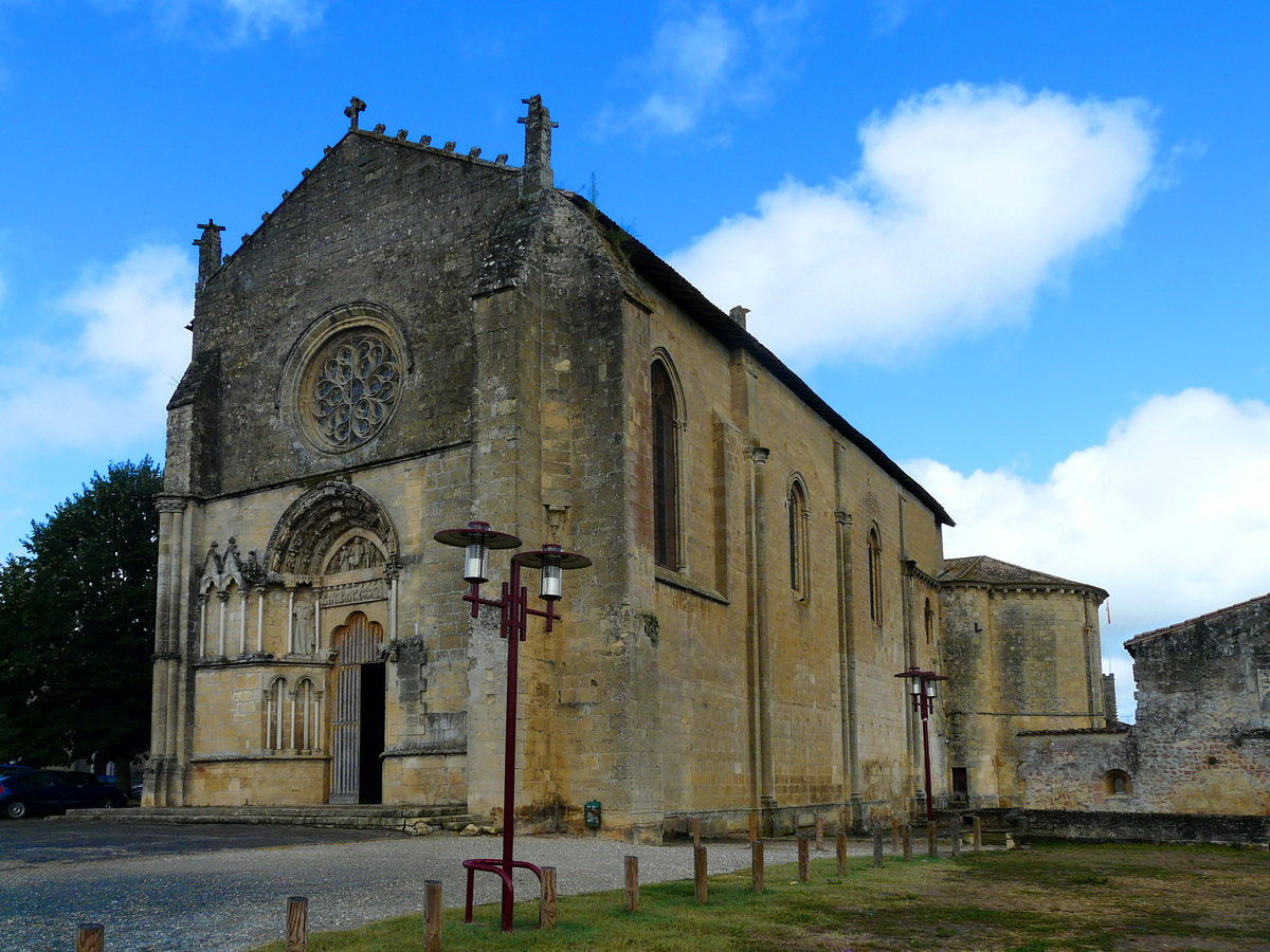 Église Saint-Sauveur-et-Saint-Martin, Saint-Macaire, Gironde, France